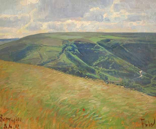 Bettenfeld. Öl auf Leinwand, 41 x 50 cm, betitelt und datiert »Bettenfeld 8.6.12«, signiert »F. v. W.«